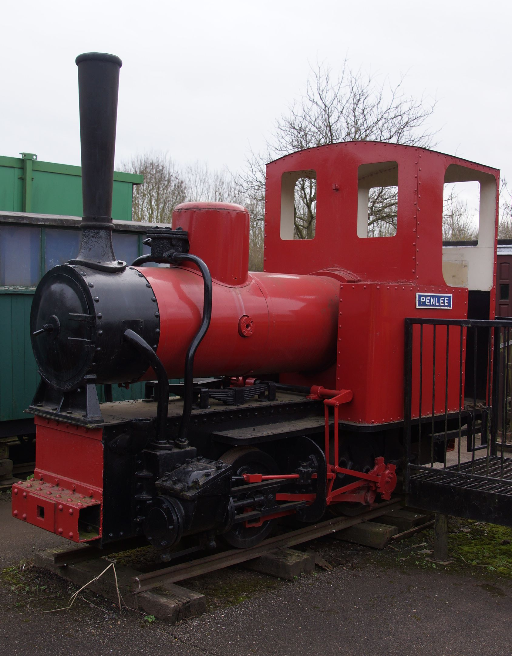 Penlee Dampflok der Leighton Buzzard Light Railway